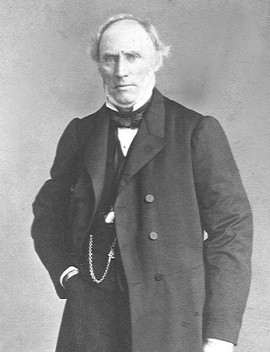 Lo psichiatra francese Louis Jean Francois Delasiauve